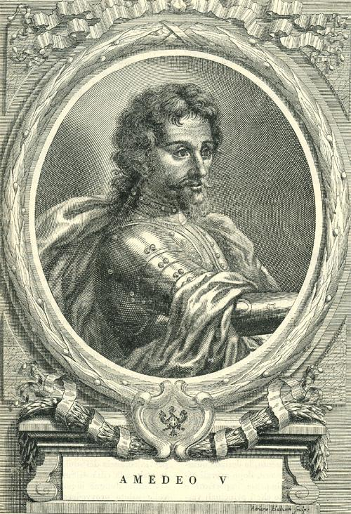 Amedeo V di Savoia (1252-1323)